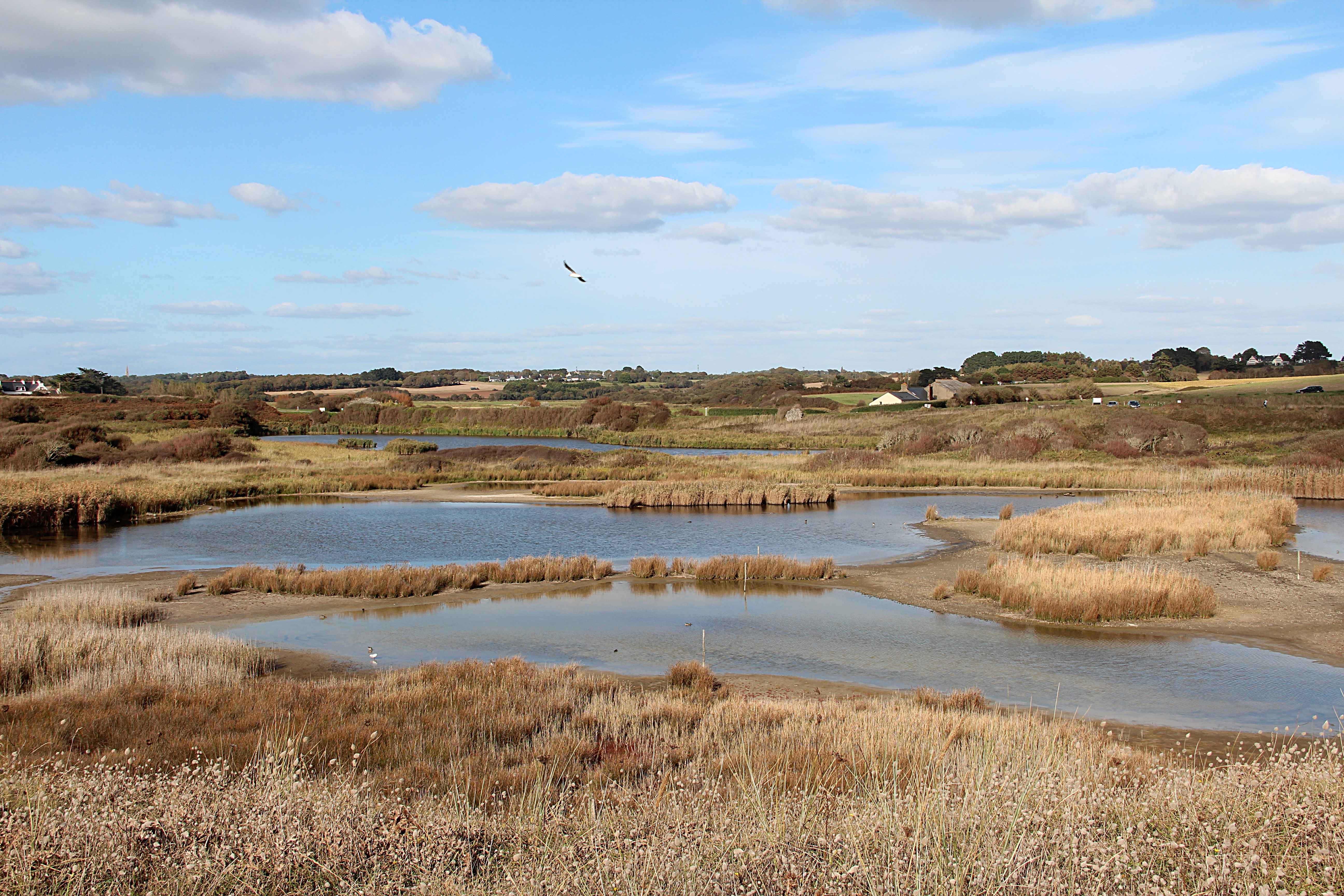 La réserve naturelle régionale des étangs du Petit et du Grand Loc'h à Guidel (Morbihan, France).